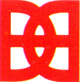 Logo 2